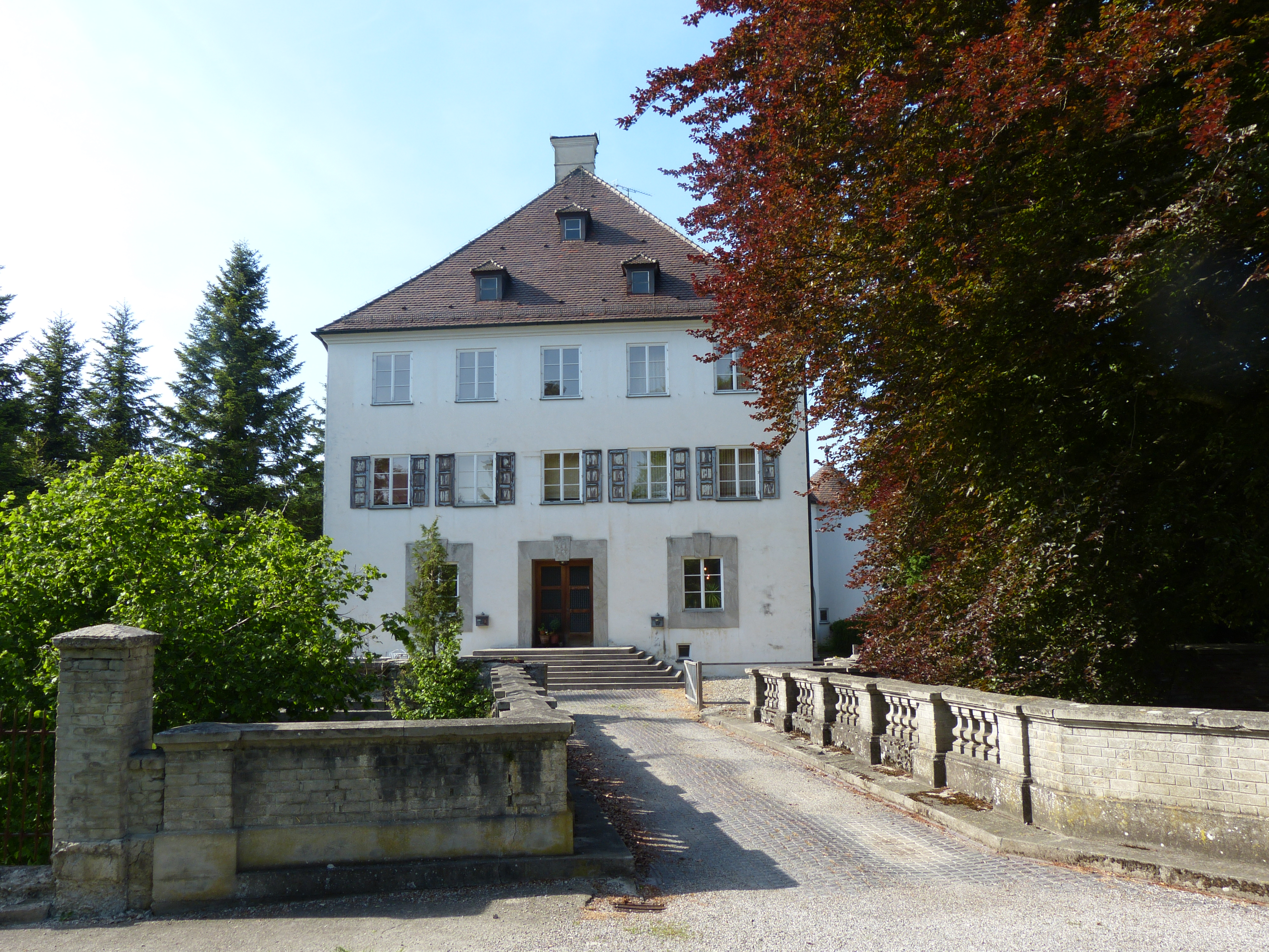 Schloss Bedernau bei Breitenbrunn, Bayern